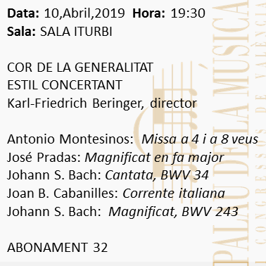 Obres de Montesinos, Pradas, Cabanilles. Mestres de Capella de la Seu Valentina